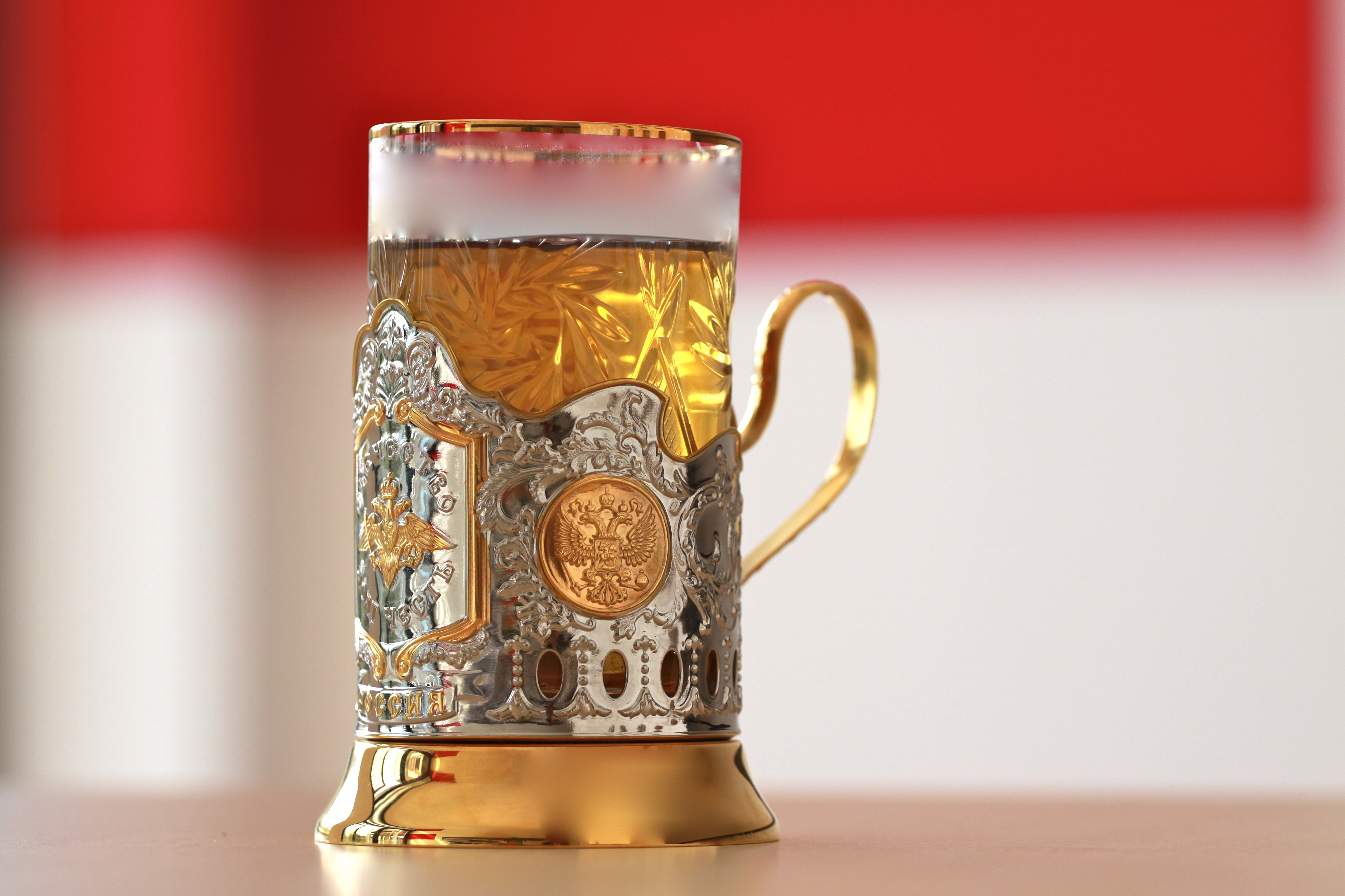 Podstakannik (russ. подстаканник), der traditionelle russische Glashalter mit Henkel, mit dem die heissen Teegläser gefahrlos in der Hand gehalten werden können.